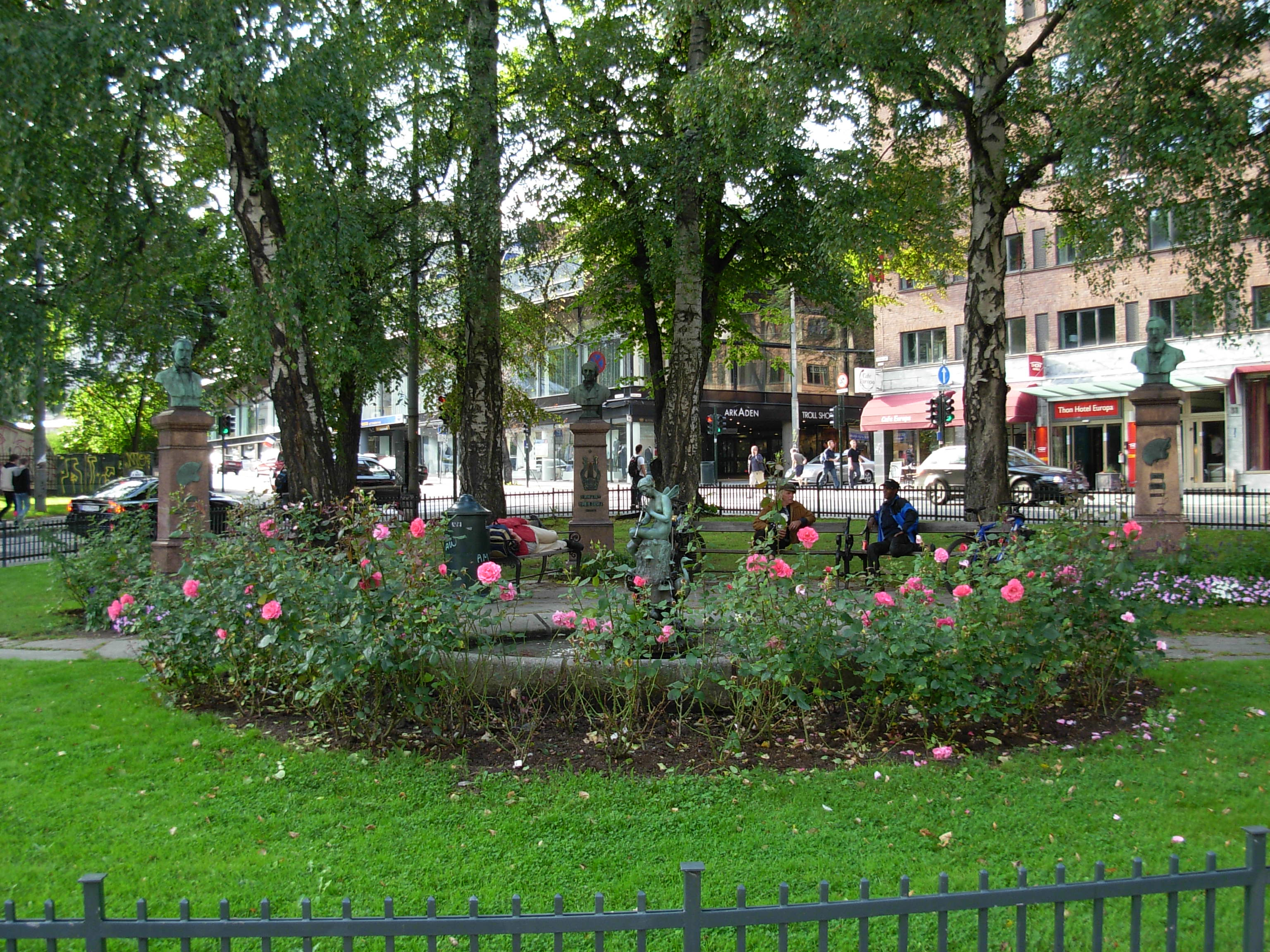 Halfdan Kjerulfs plass, Oslo